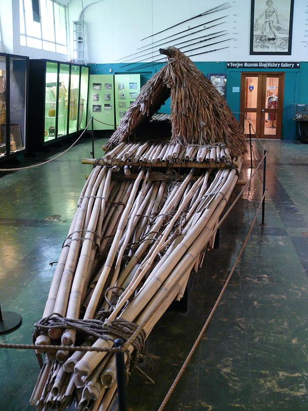 River raft, in Museum, Suva, Fiji